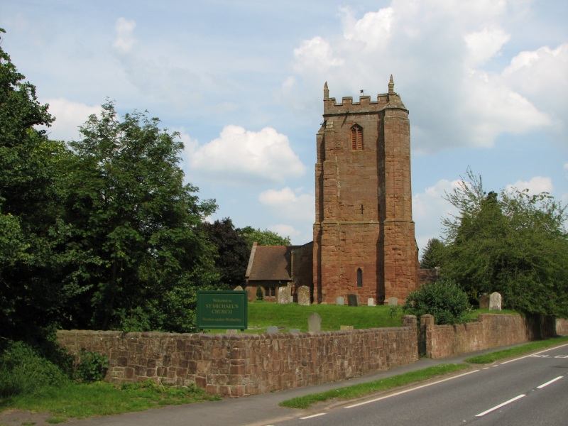 St. Michael's Church in Weston under Wetherley